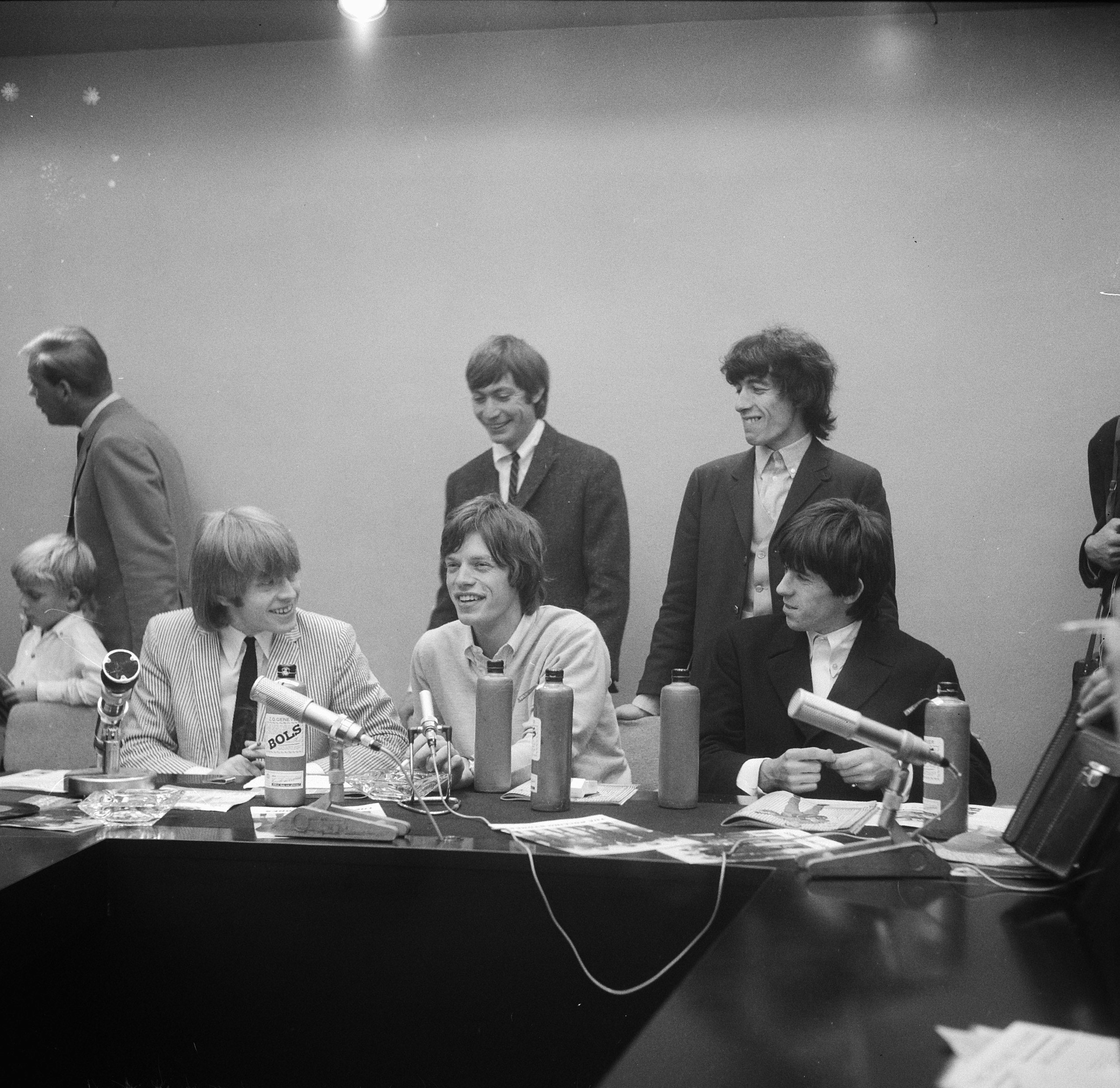 Collectie / Archief : Fotocollectie Anefo Reportage / Serie : [ onbekend ] Beschrijving : Rolling Stones op Schiphol Datum : 8 augustus 1964 Locatie : Noord-Holland, Schiphol Trefwoorden : aankomsten Instellingsnaam : Rolling Stones Fotograaf : Gelderen, Hugo van / Anefo Auteursrechthebbende : Nationaal Archief Materiaalsoort : Negatief (zwart/wit) Nummer archiefinventaris : bekijk toegang 2.24.01.03 Bestanddeelnummer : 916-7423